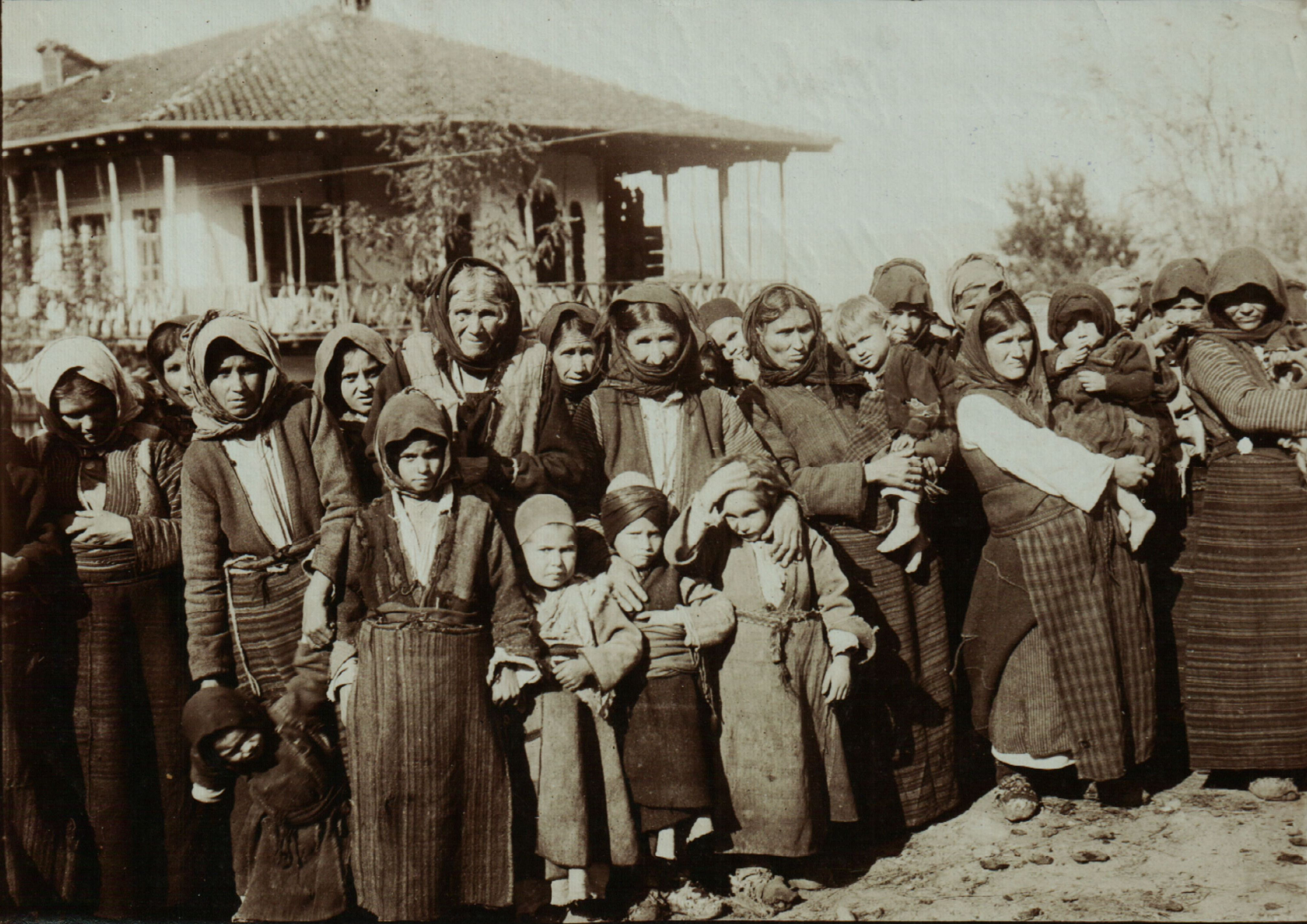 Групови снимки и пощенски картички на македонски бежанци.